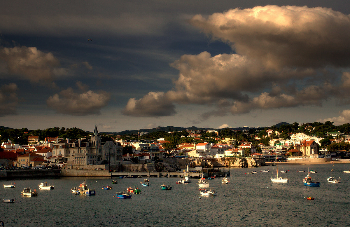 Palácio dos Duques de Loulé This file was uploaded for Wiki Loves Monuments in Portugal with the unique identifier 4304704.